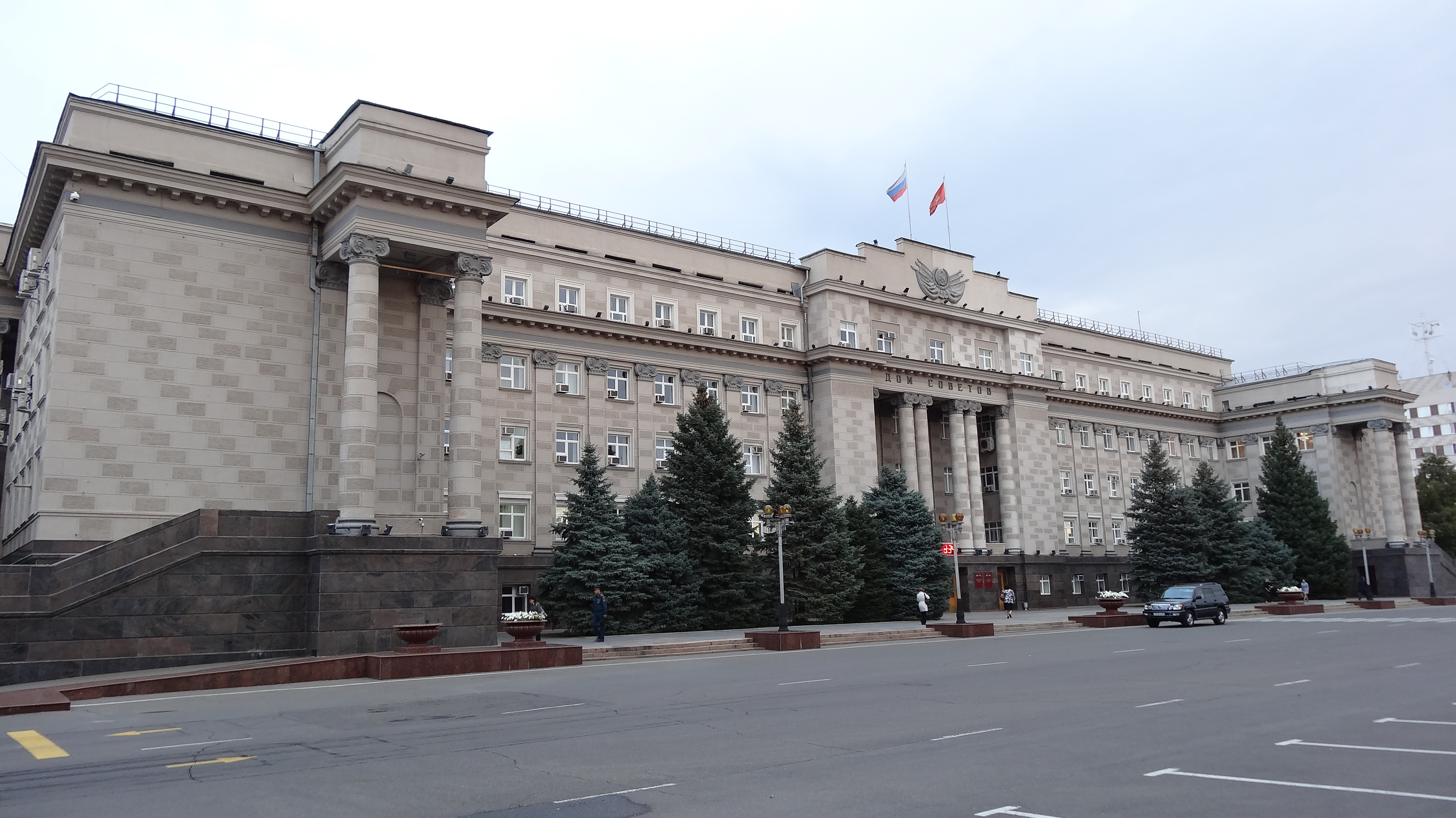 Дом советов (Оренбургская область, Оренбург, ленина площадь)